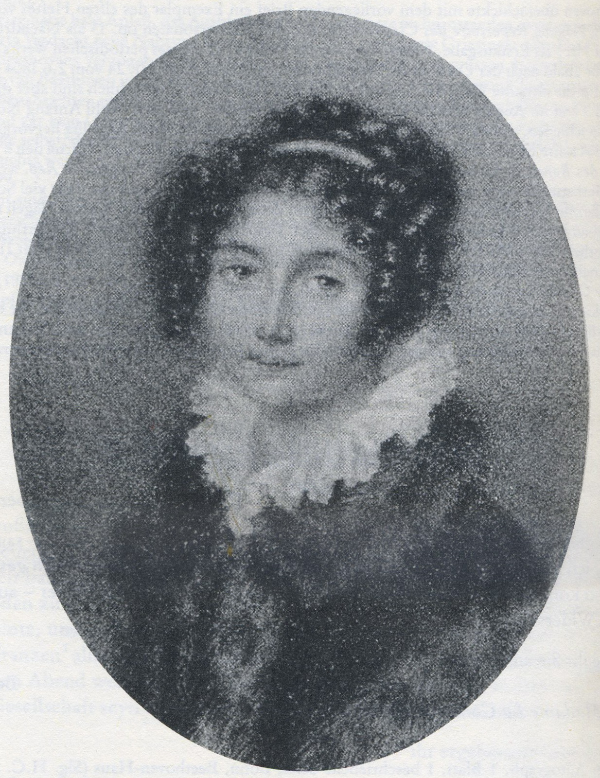 Josephine Brunsvik, unbezeichnete Bleistiftminiatur